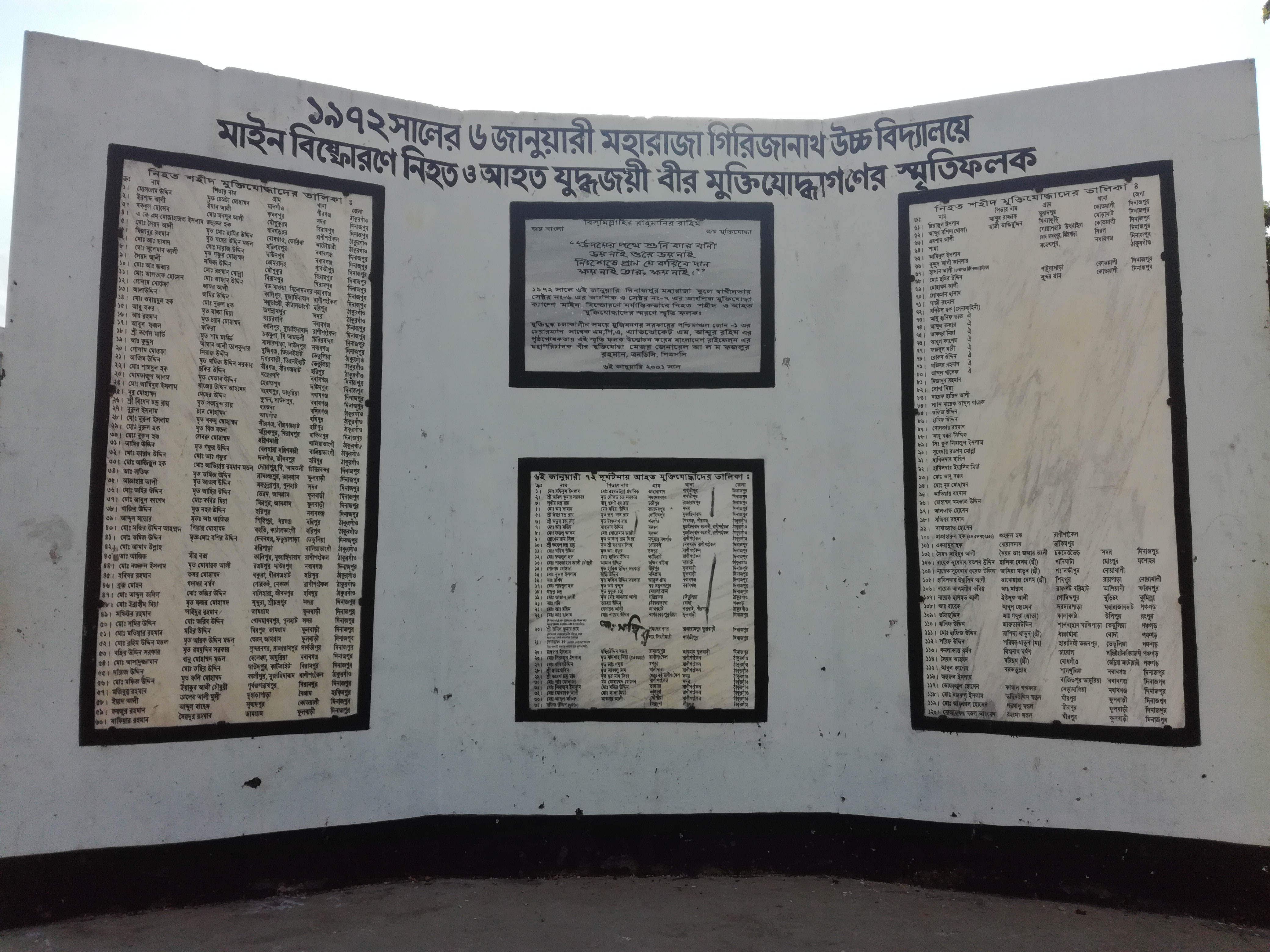 স্মৃতি ফলক ২